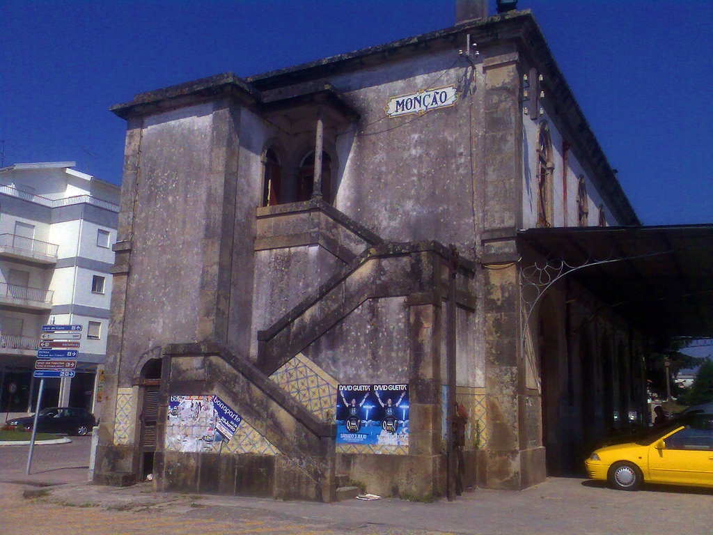 Agora não há mais Comboio em Monção.